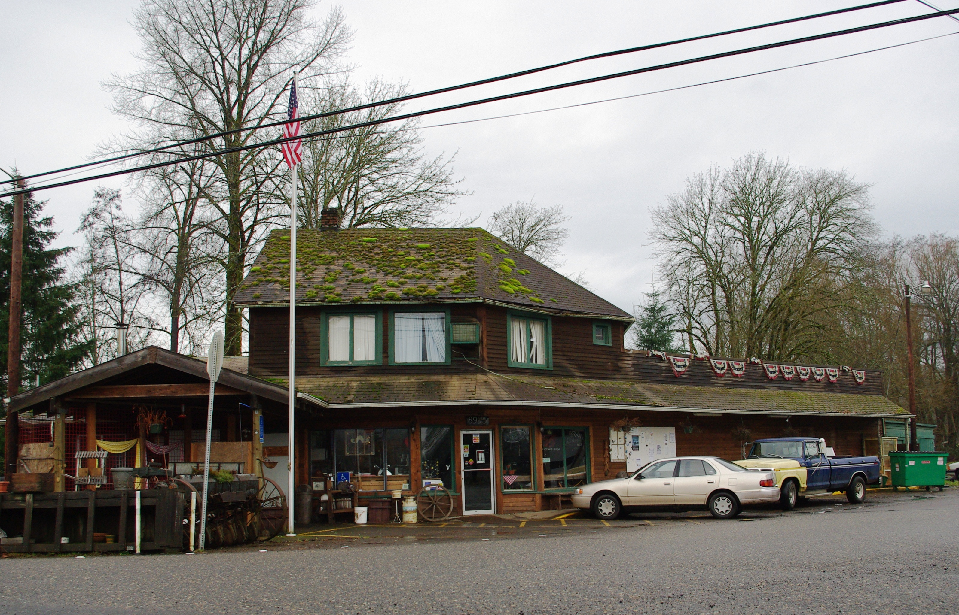 Store in Gales Creek, Oregon.